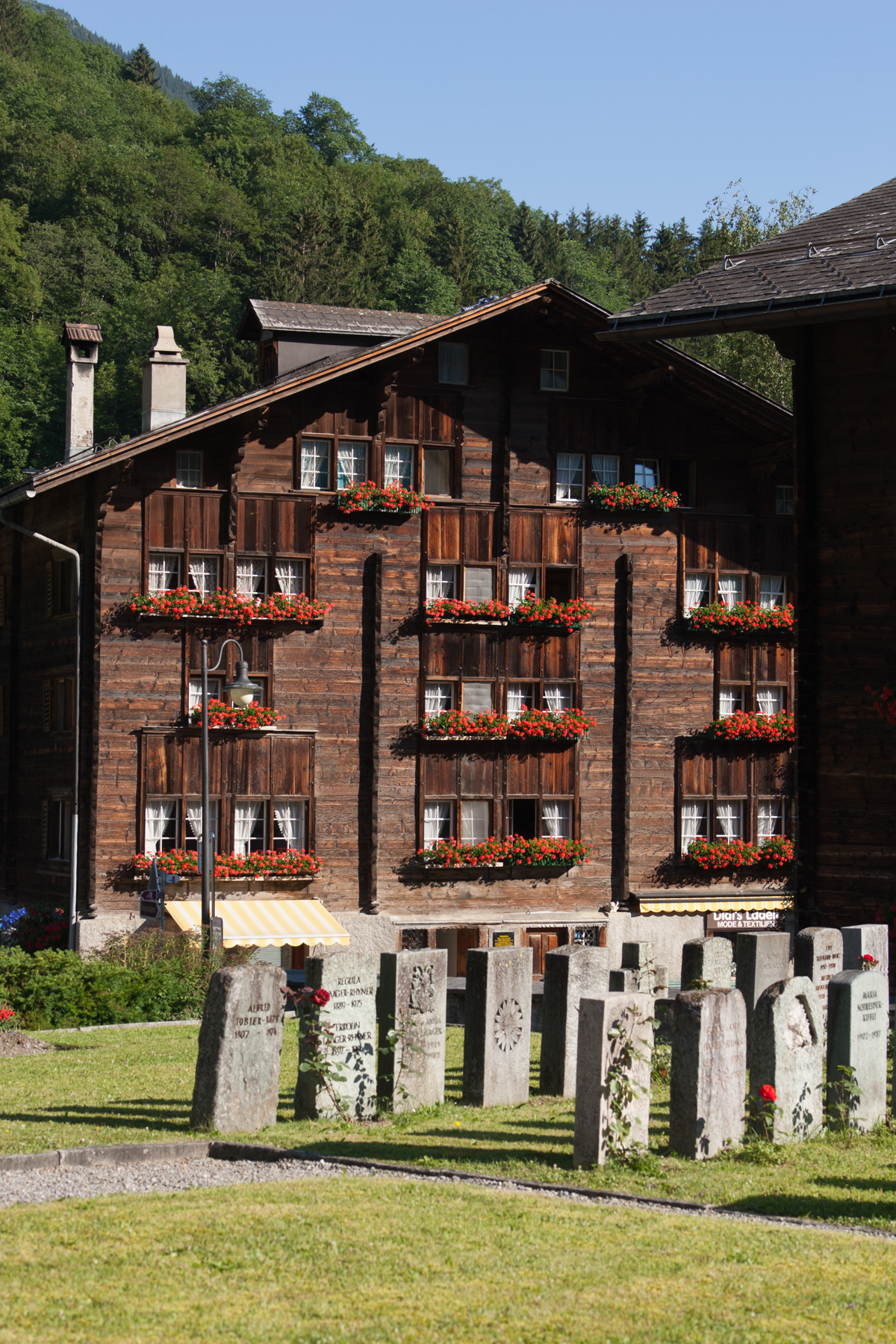 Zentnerhaus in Elm